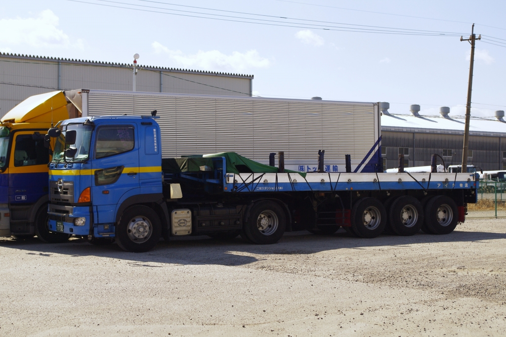 平床トレーラー